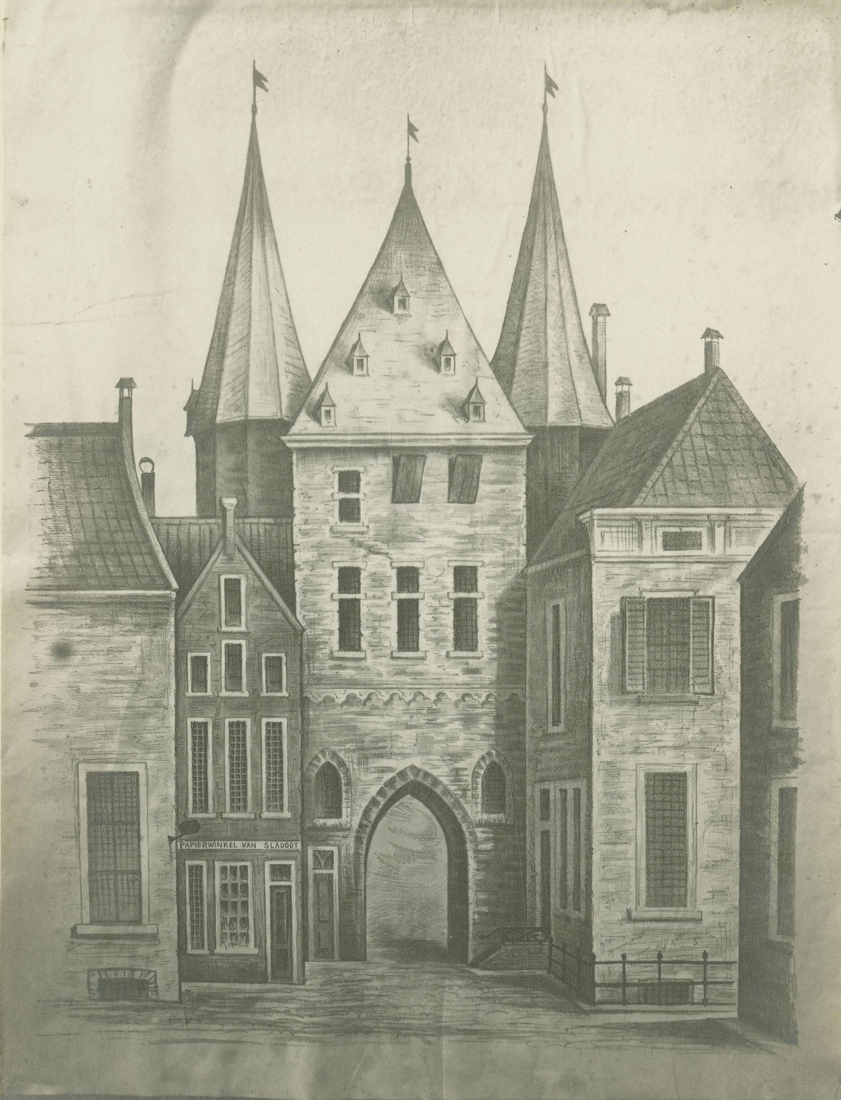 Anonieme lithografie van de (binnenzijde van de) Poelepoort uit 1828, het jaar dat de poort werd gesloopt. Gefotografeerd door Piet Kramer. Door mij iets verkleind om alleen de lithografie weer te geven.